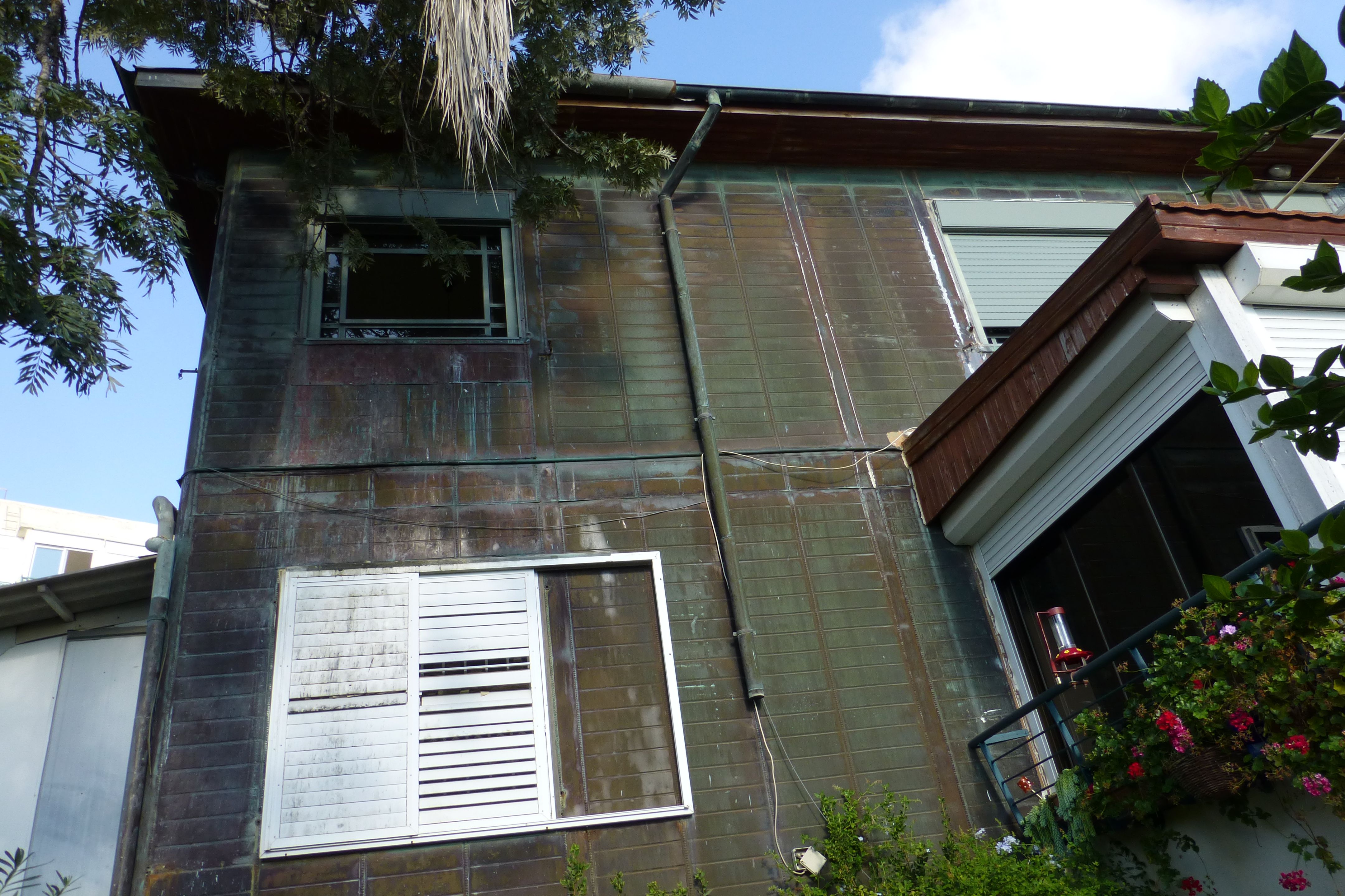 בית הנחושת במרכז הכרמל בחיפה